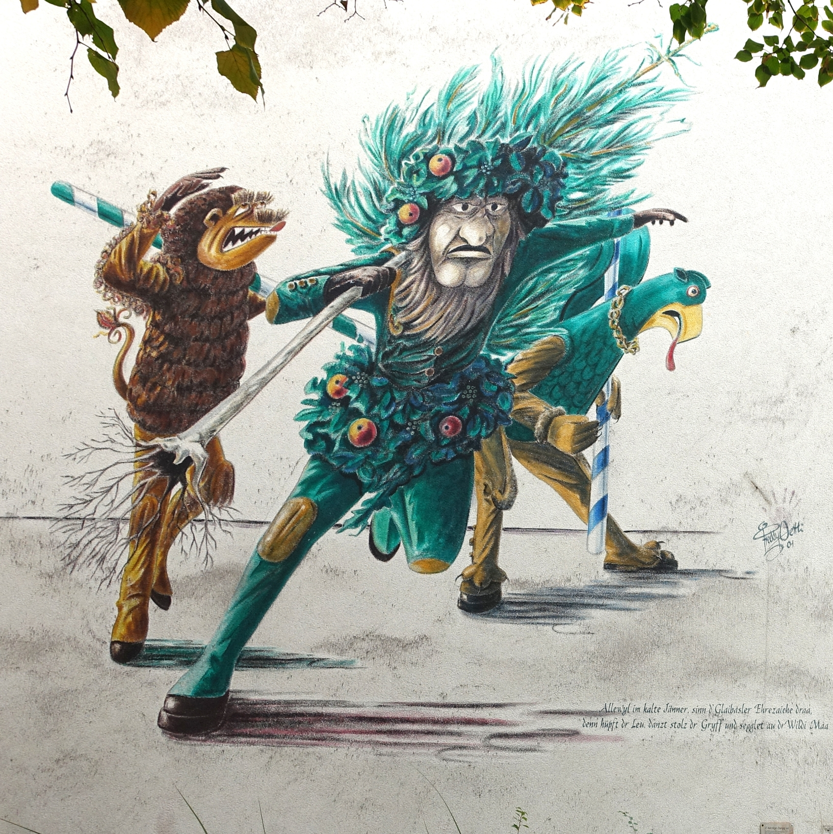 Vogel Gryff Wandgemälde (2001) von Freddy Oettli. Riehentorstrasse 27, Basel.